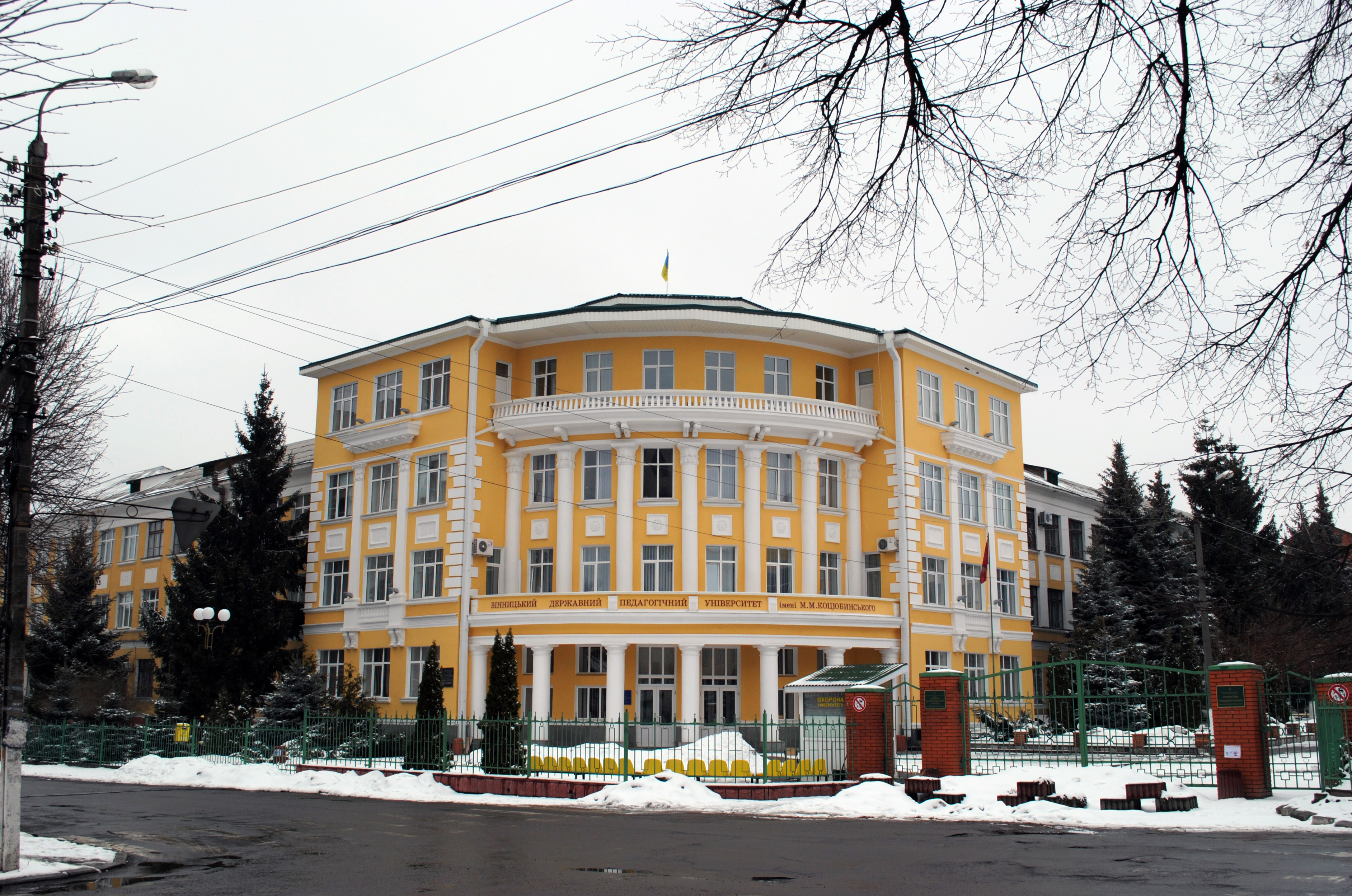 Педуніверситет (Головний корпус), Вінниця, вул. Острозького, 24/32